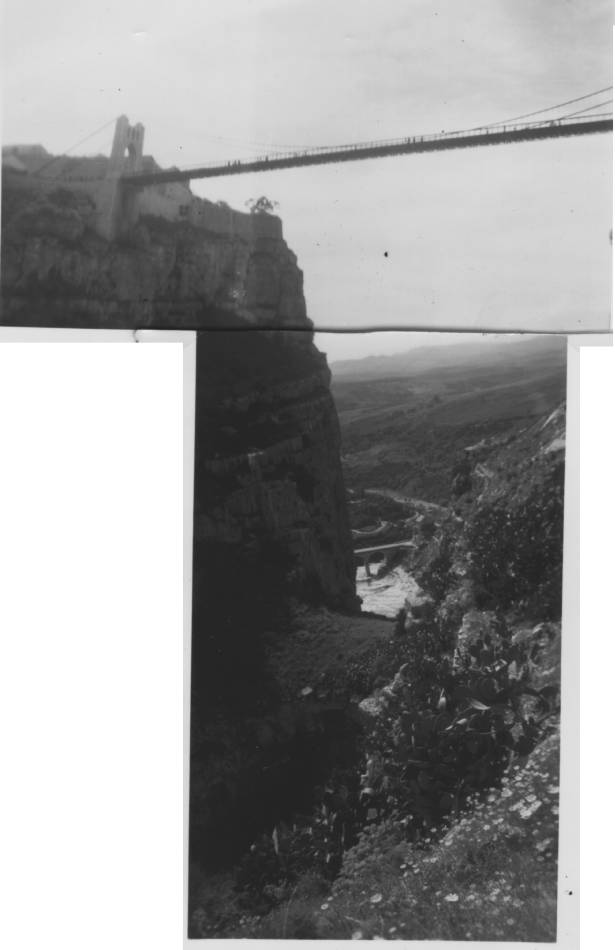 Je suis l'auteur de cette photo prise le 14 mars 1962.